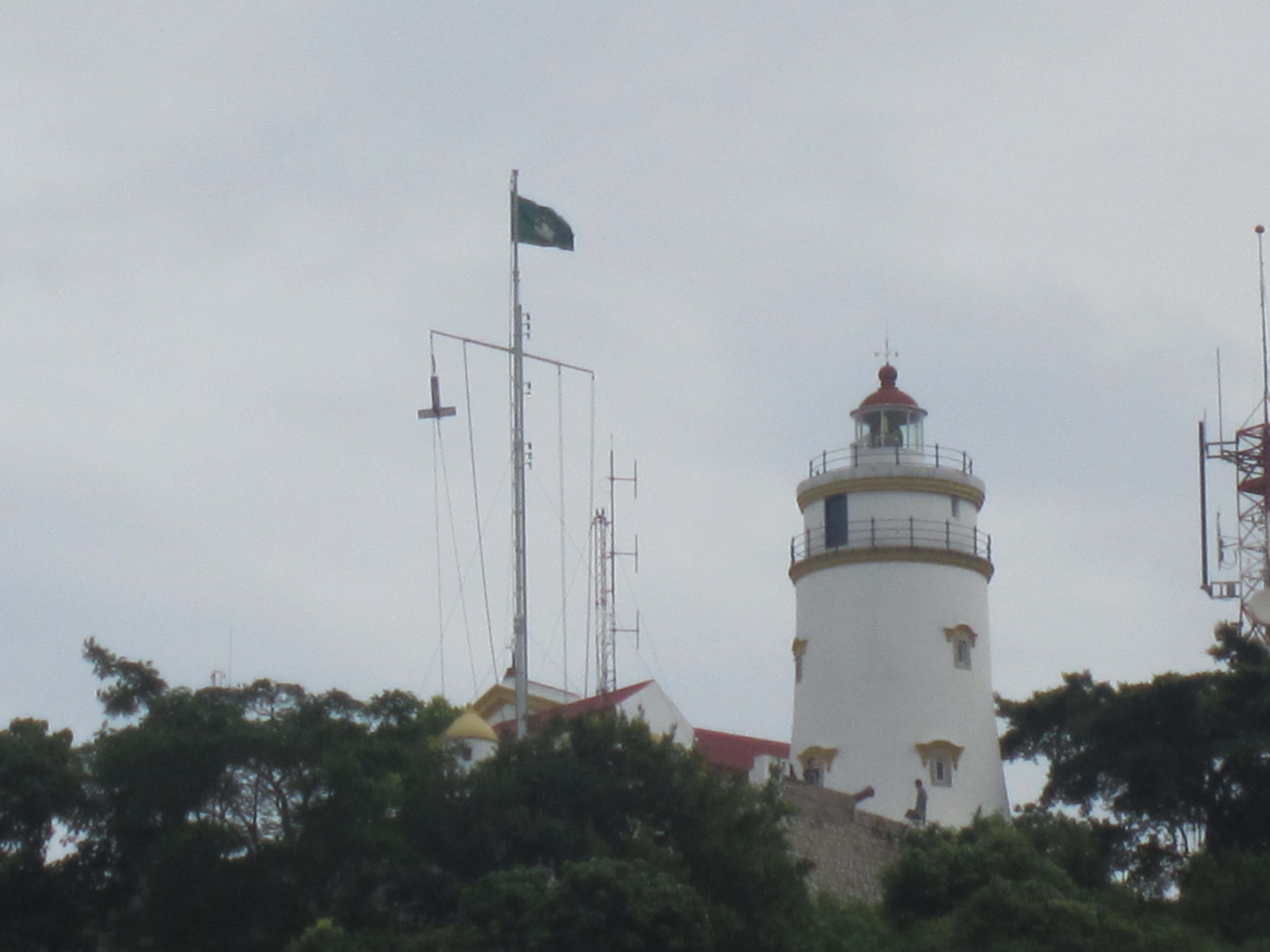 O Sinal N.º 3 de Tempestade Tropical na Fortaleza da Guia